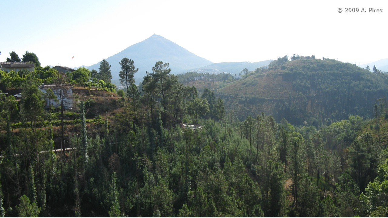 Desculpem a excessiva contra-luz, mas foi a única oportunidade que tive para ir à ponte e infelizmente deste lado tinha o Sol de frente. Aqui podemos ver a N 210 prestes a descer para o Rio Tâmega. Ao final dessa curva encontra-se, escondido, o cruzamento com a indicação da Estação de Mondim. Mal sabe o choque que o visitante desconhecido vai apanhar no final desta pequena estrada... Ao fundo temos o alto da Senhora da Graça que dispensa apresentações. Devido às curvas do vale do Tâmega nesta zona, embora Matamá e a ponte da N210 sejam próximas uma da outra, é impossível verem-se uma à outra.